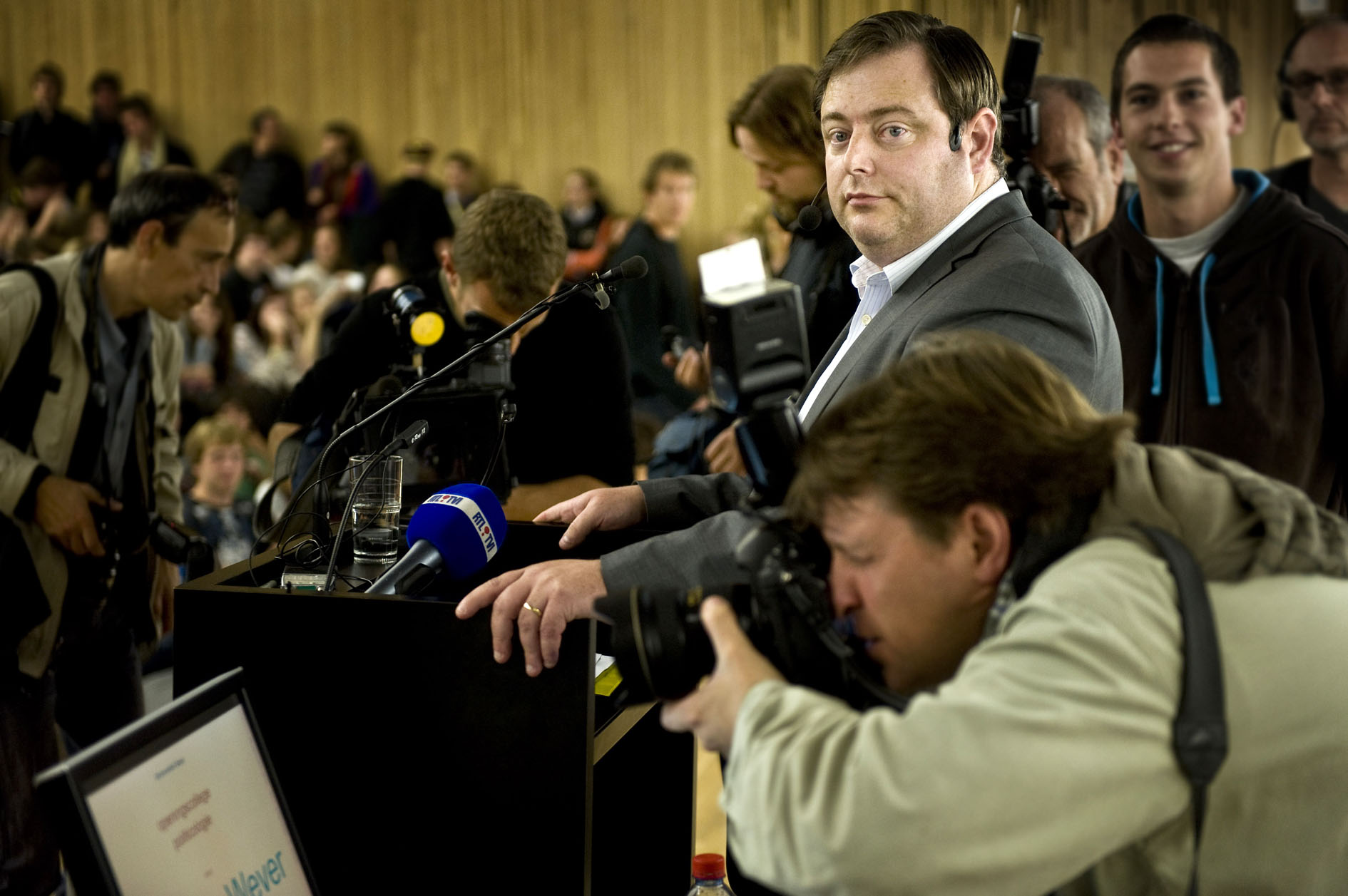 Bart De Wever, Vlaams politicus en partijvoorzitter van de Nieuw-Vlaamse Alliantie.hier tijdens openingscollege politicologie (bij Prof. Carl Devos) aan UGent.